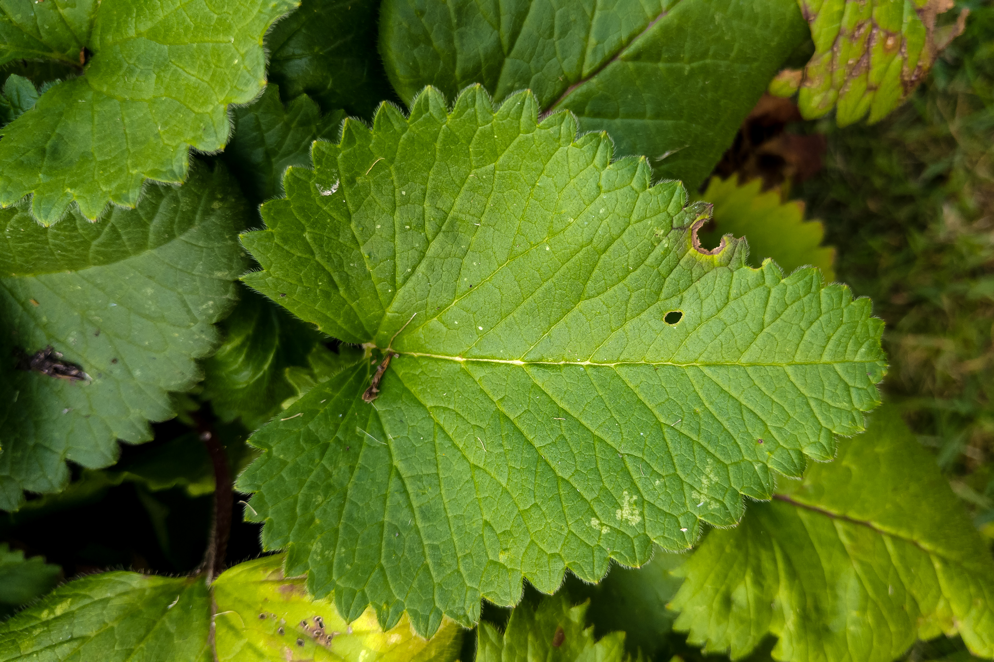 Der Heilziest, die Echte Betonie, lat.: Betonica officinalis oder Stachys betonica